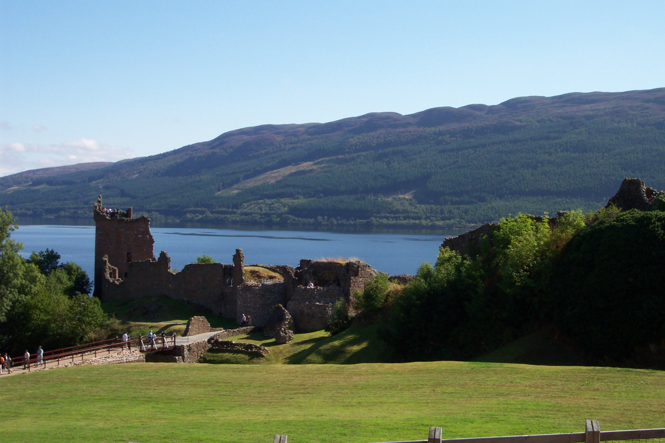 Castillo Urquhart en el Lago Ness